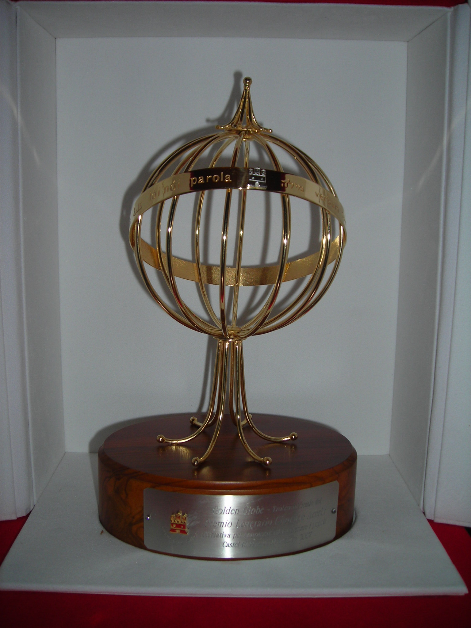 il Golden Globe, simbolo del Premio Leterario Giuseppe Acerbi